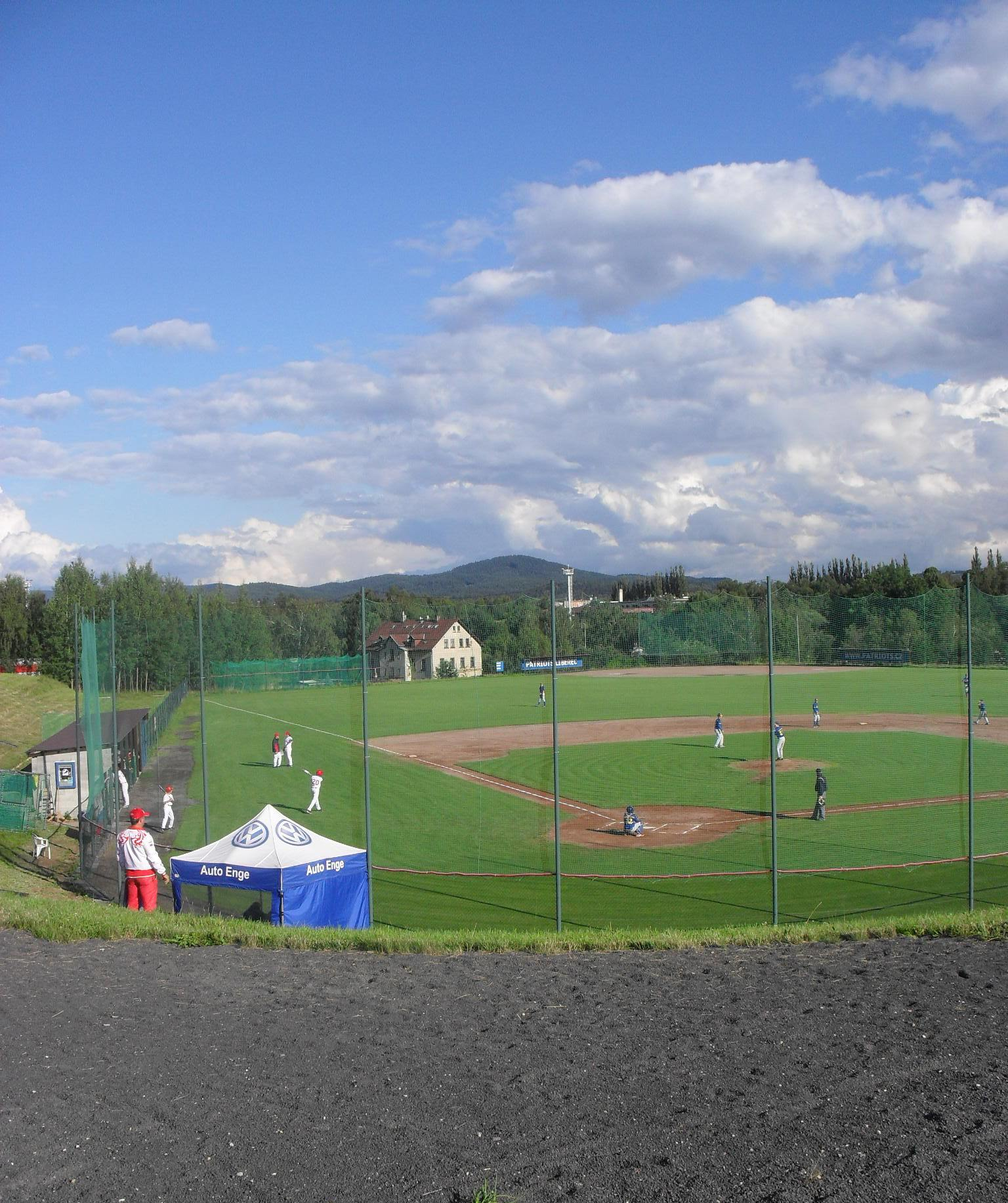 Baseballový stadion v Liberci, sport park Liberec